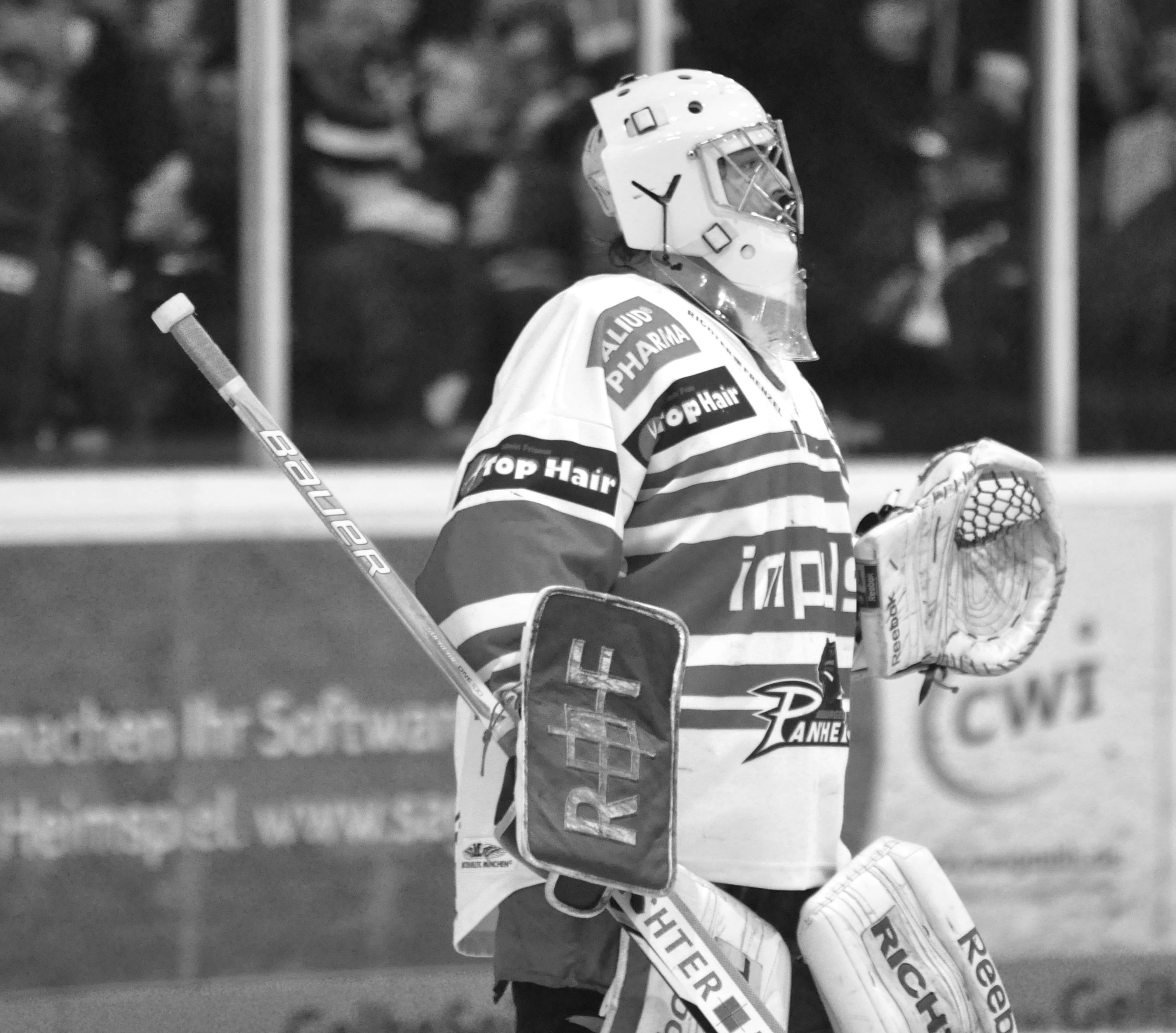 Straubing Tigers - Augsburg Panther 04.03.2012 DEL Deutsche Eishockey Liga